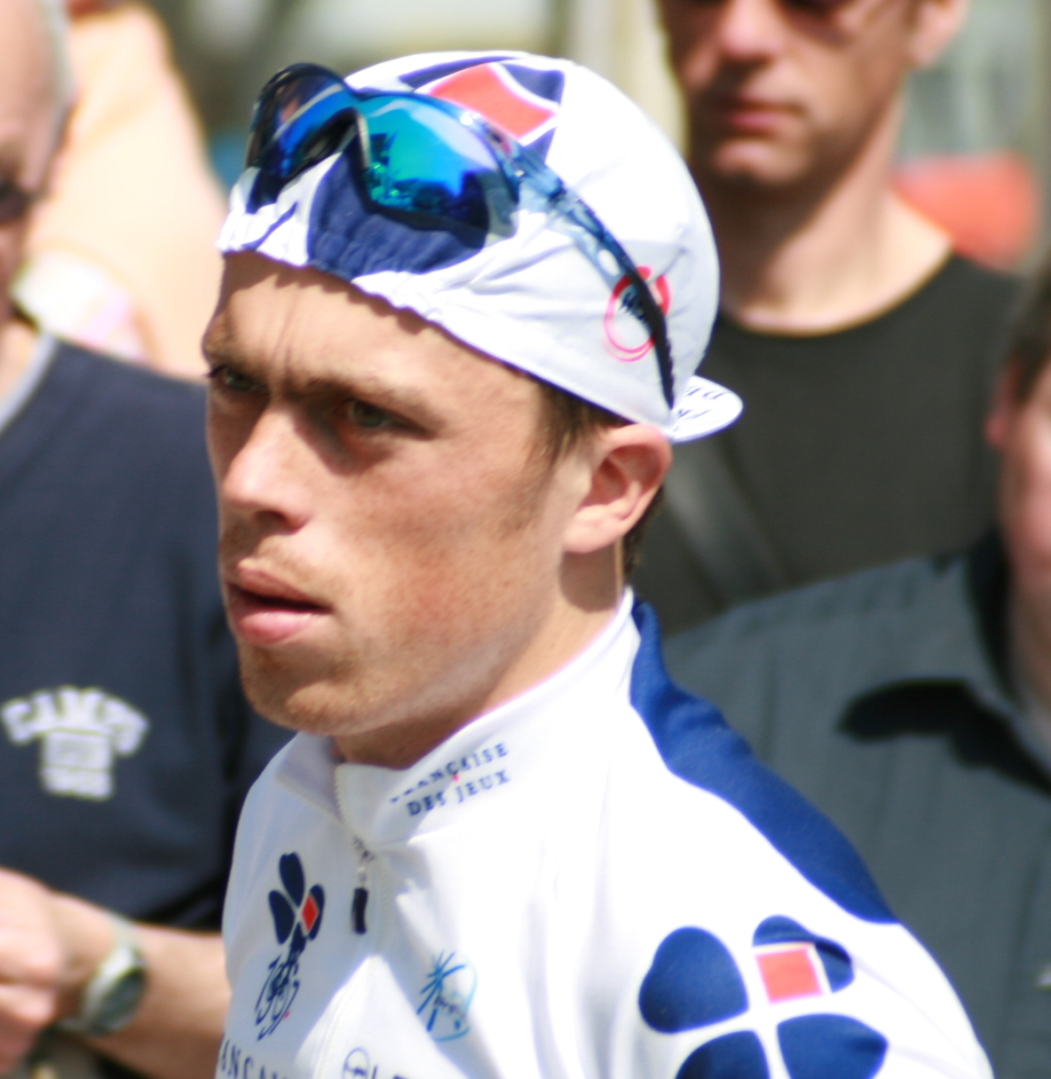 Cyrille Monnerais aux Quatre jours de Dunkerque 2008